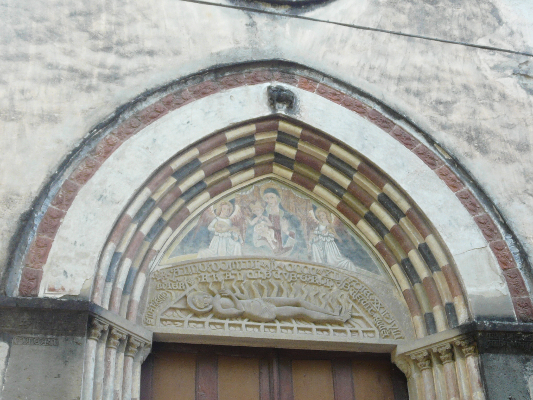 Chiesa di San Lorenzo, Murialdo, Liguria, Italia